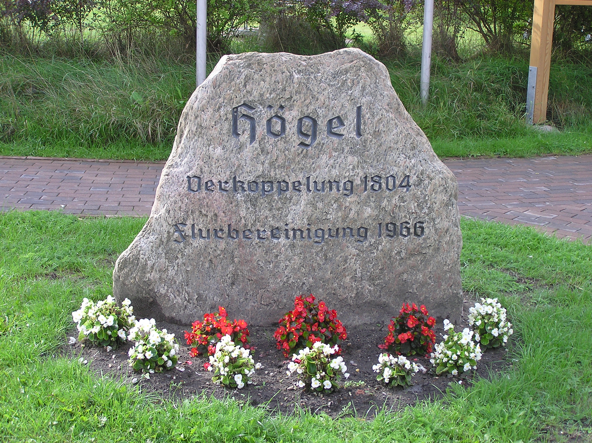 Denkstein